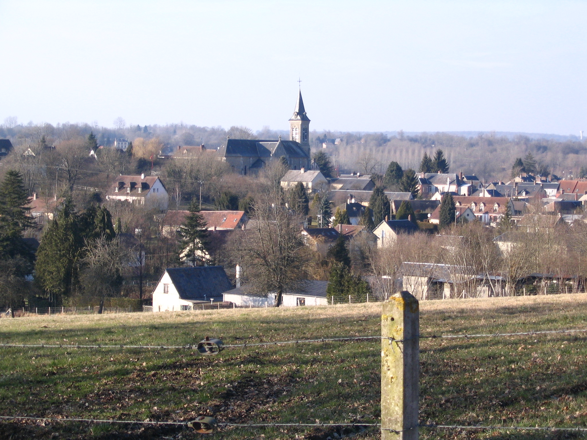 Vue sur le centre de la commune de Sainte-Gauburge-Sainte-Colombe (Orne, France)